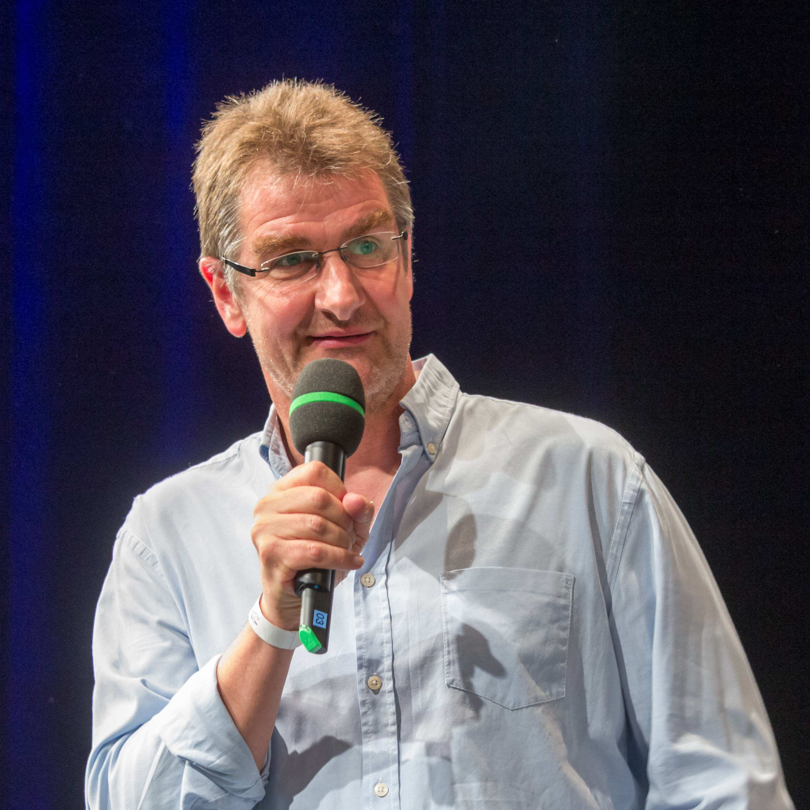 Birlikte 2016: Dialogmarathon - Nicht Anderen beim Reden zuschauen, sondern Mitreden! - 15:00 Uhr: Wem gehört die Stadt? – Wer gestaltet die Stadt? Teilnehmer: Henriette Reker, Oberbürgermeisterin der Stadt Köln und Claus Leggewie, Politikwissenschaftler, Direktor des Kulturwissenschaftlichen Instituts Essen (KWI) Moderation: Jürgen Wiebicke und Thomas LaueVeranstaltungsort: Depot 1 Schauspiel Köln/Carlswerk Foto: Moderator Jürgen Wiebicke